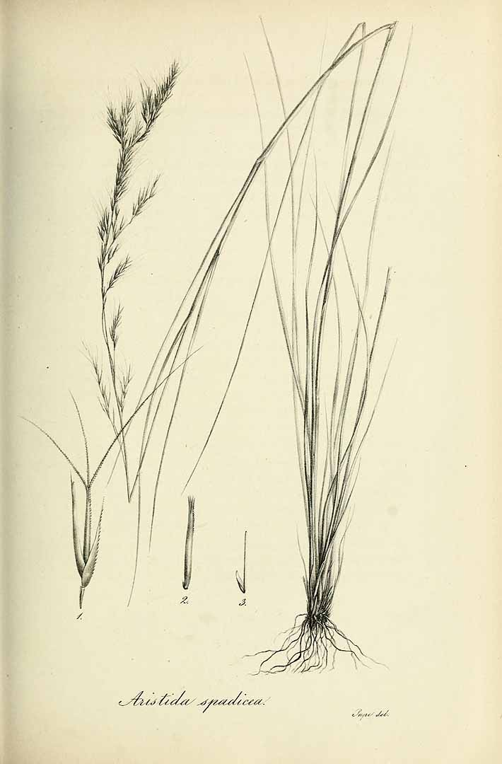 Aristida spadicea = Aristida laxa Cav.